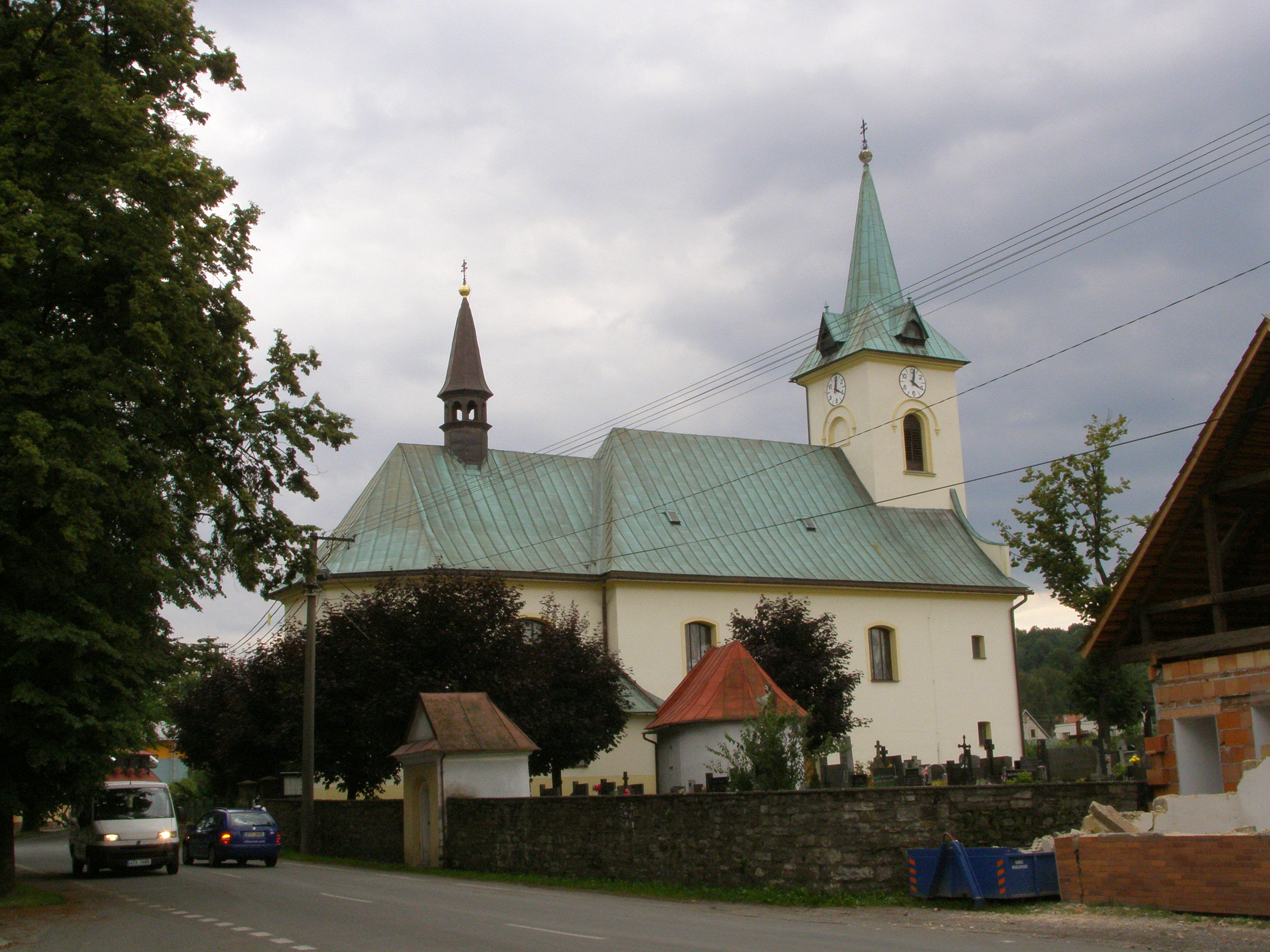 Kozlovice, kostel sv. Michaela archanděla